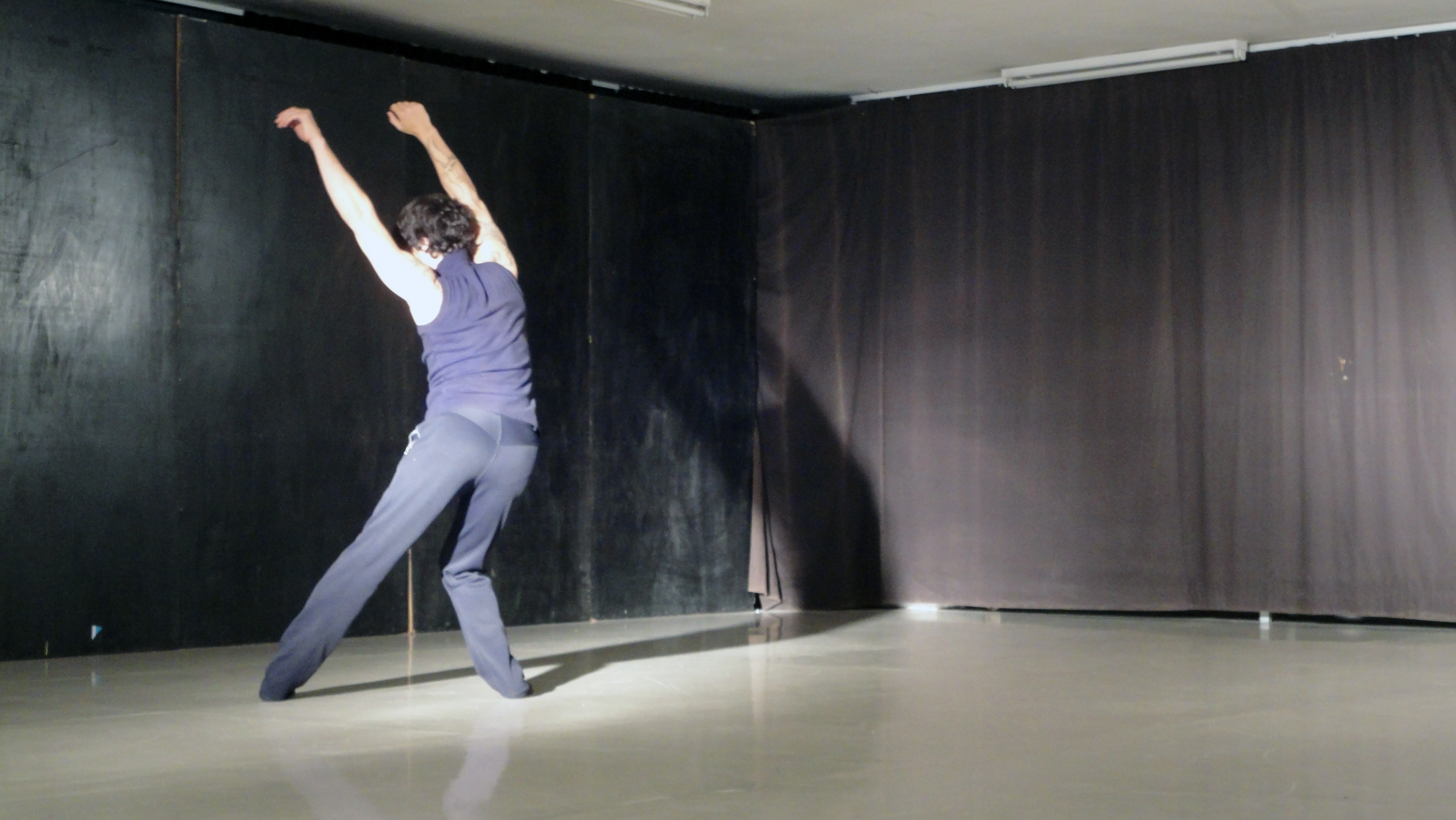 עידו תדמור מופיע ב"סיר של סימה" במסגרת פסטיבל בויידם, מרכז ביכורי העיתים, 2012